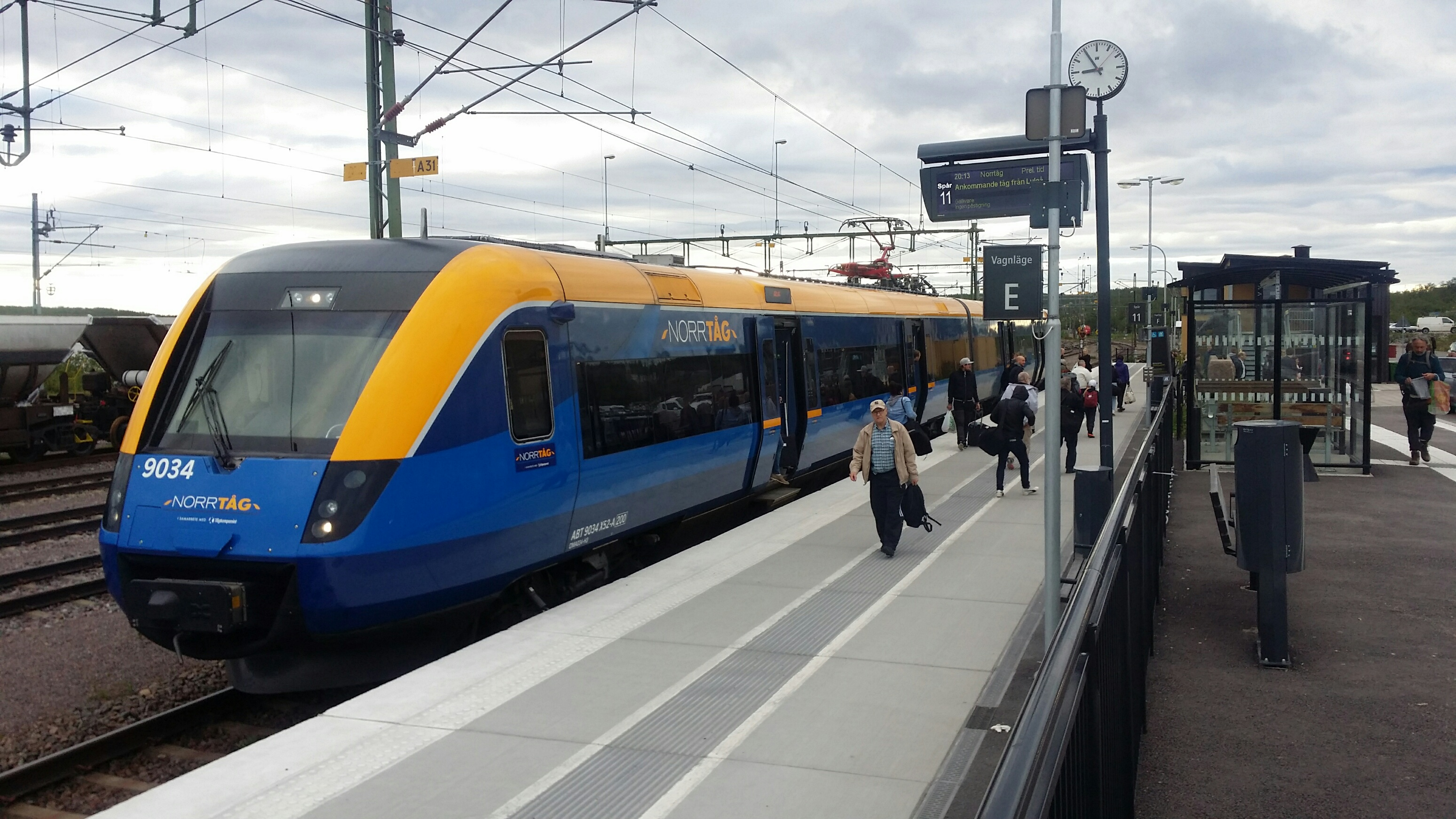 Den provisoriske holdeplassen med ankommet tog fra Luleå.